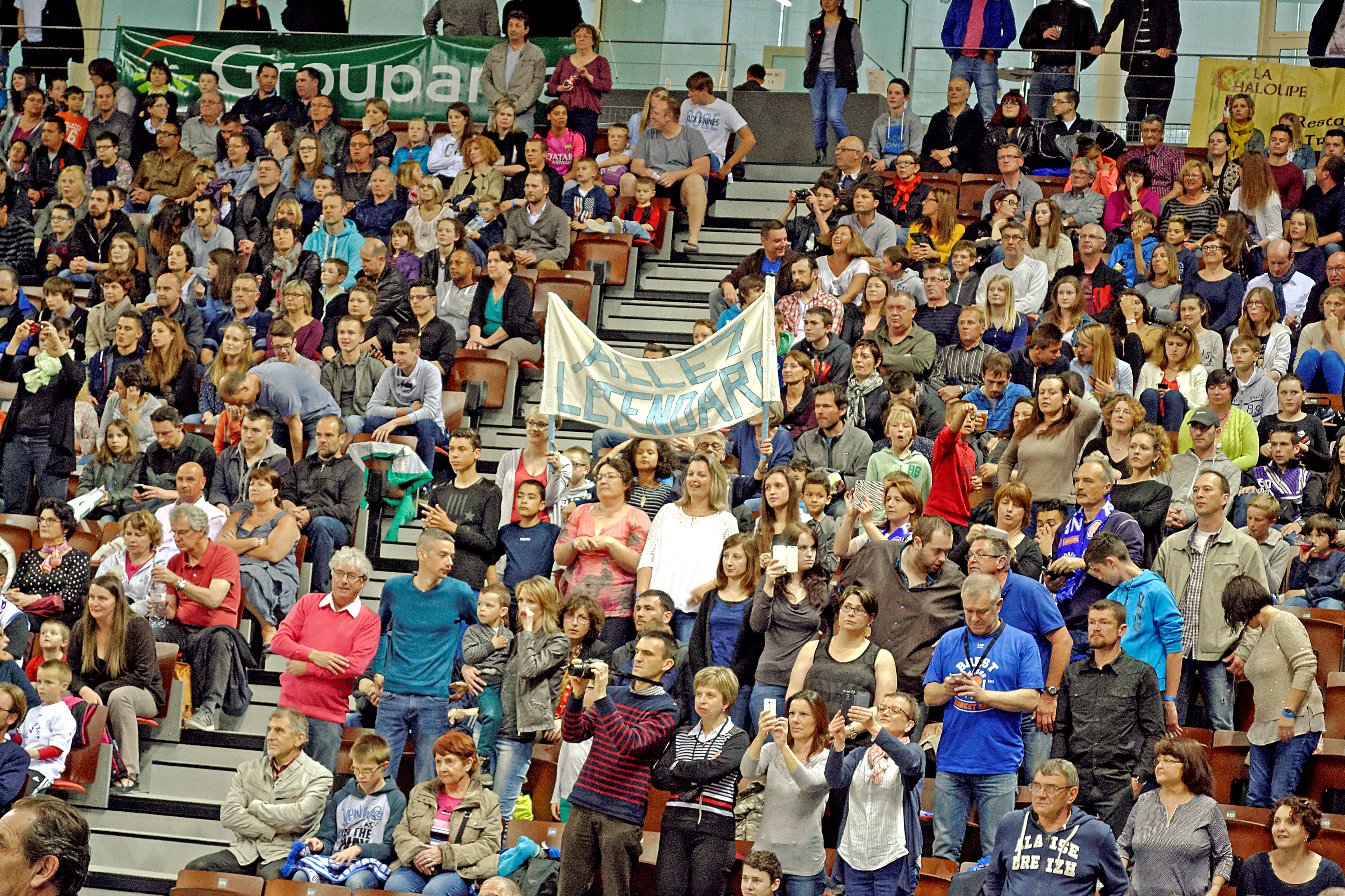 25 avril 2015. Match de basketball dans la salle Brest Arena marquant les premiers pas de l'équipe de Brest, l'Étendard de Brest, dans l'enceinte conçue à l'origine pour elle.